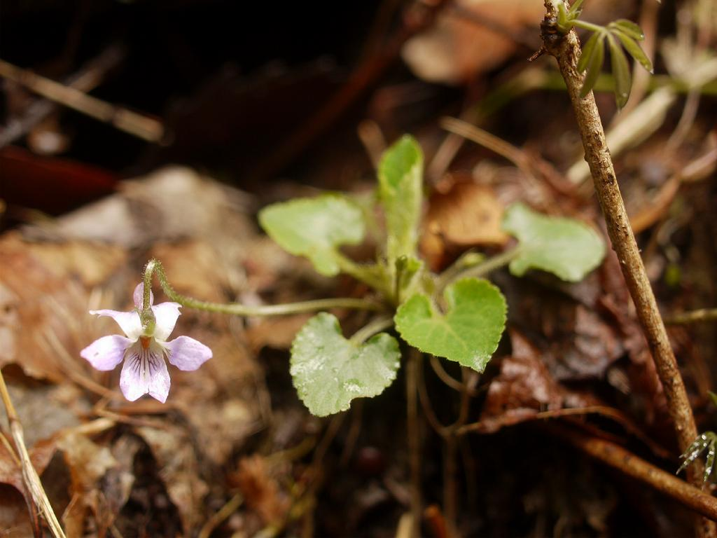 Viola hondoensis: アオイスミレ 2010.3.13 和歌山県田辺市：tanabe city.Wakayama pref. Japan